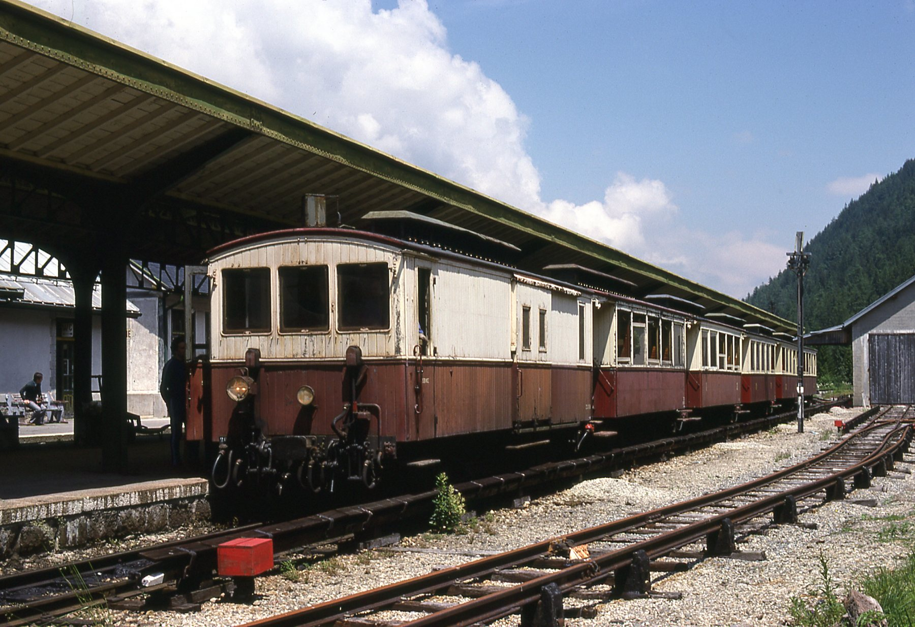 Photo: Trams aux Fils. Ancien matériel français, n'existe plus à ce jour.